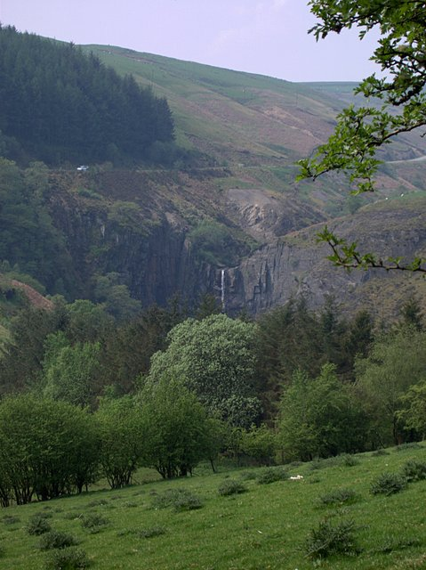 Ffrwd Fawr